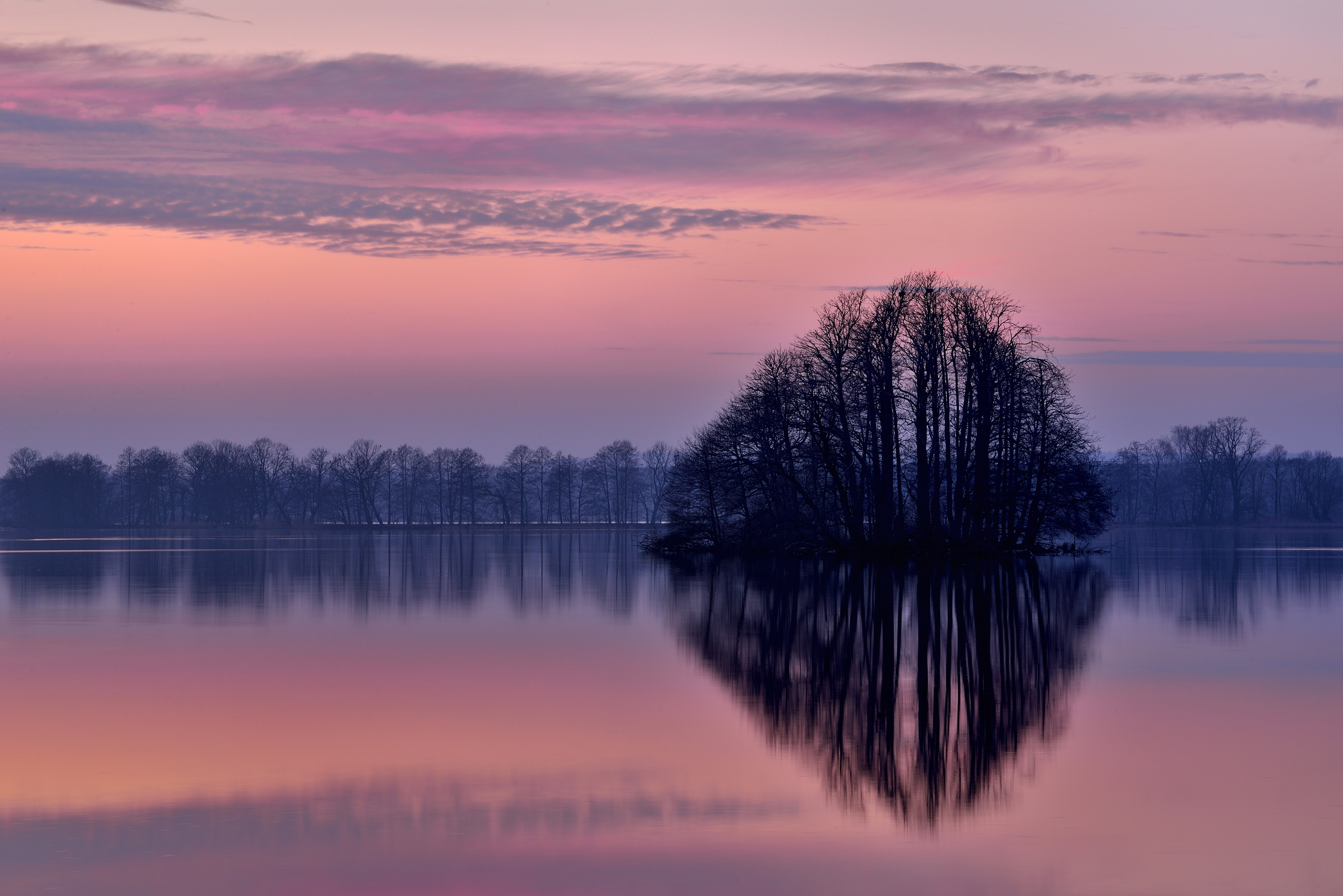 Park Krajobrazowy Dolina Baryczy, Rezerwat Stawy Milickie